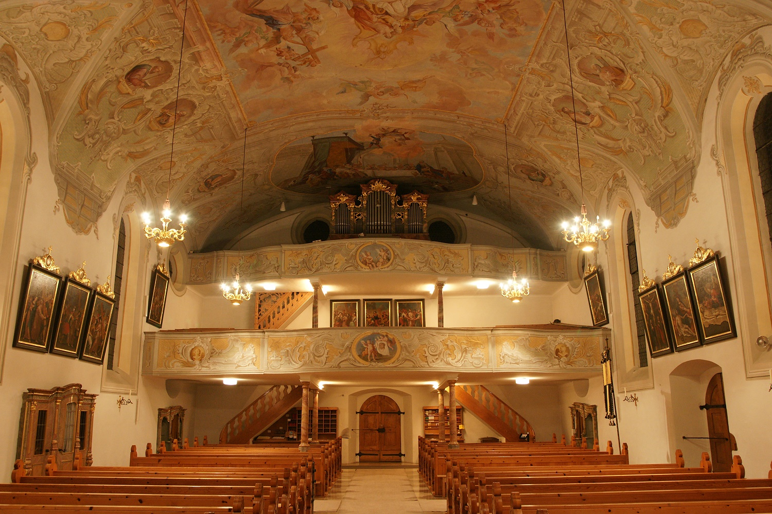 Kath. Pfarrkirche hl. Nikolaus. Innenansicht